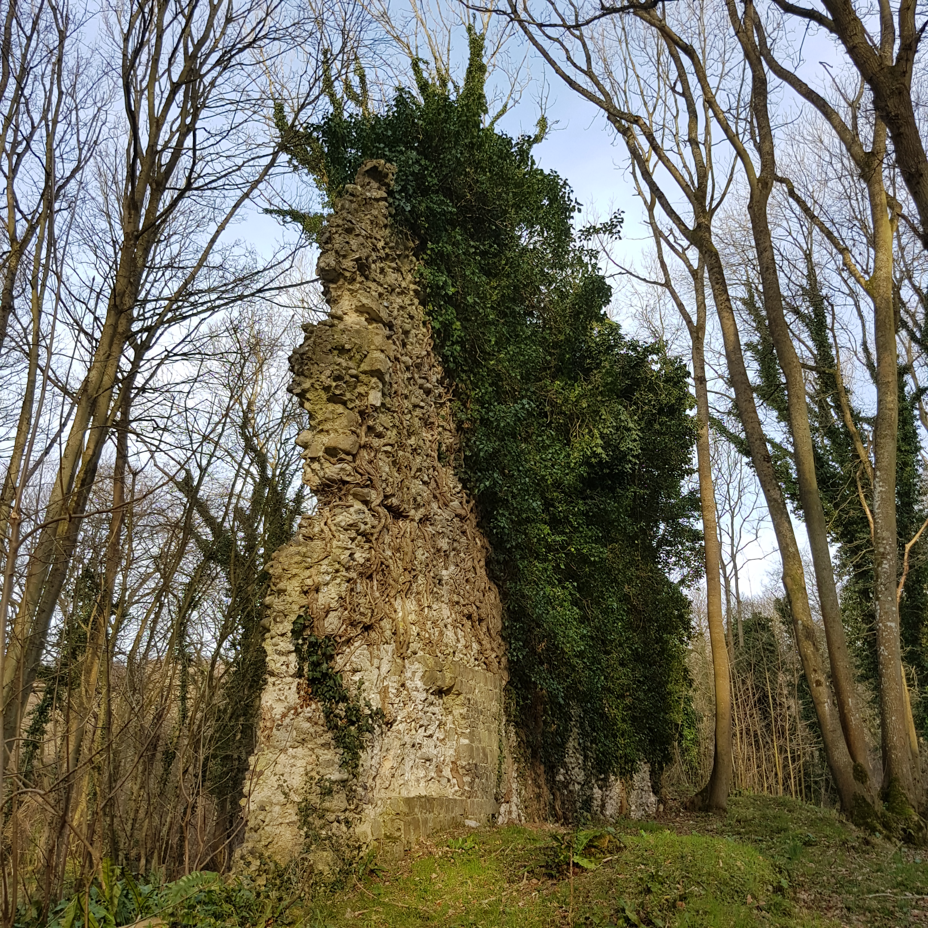 Ruine d'un pan de murs du château de Bernouville.